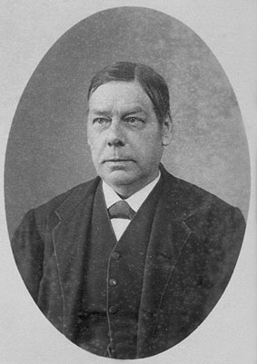 Jan Kappeyne van de Coppello, Dutch prime minister